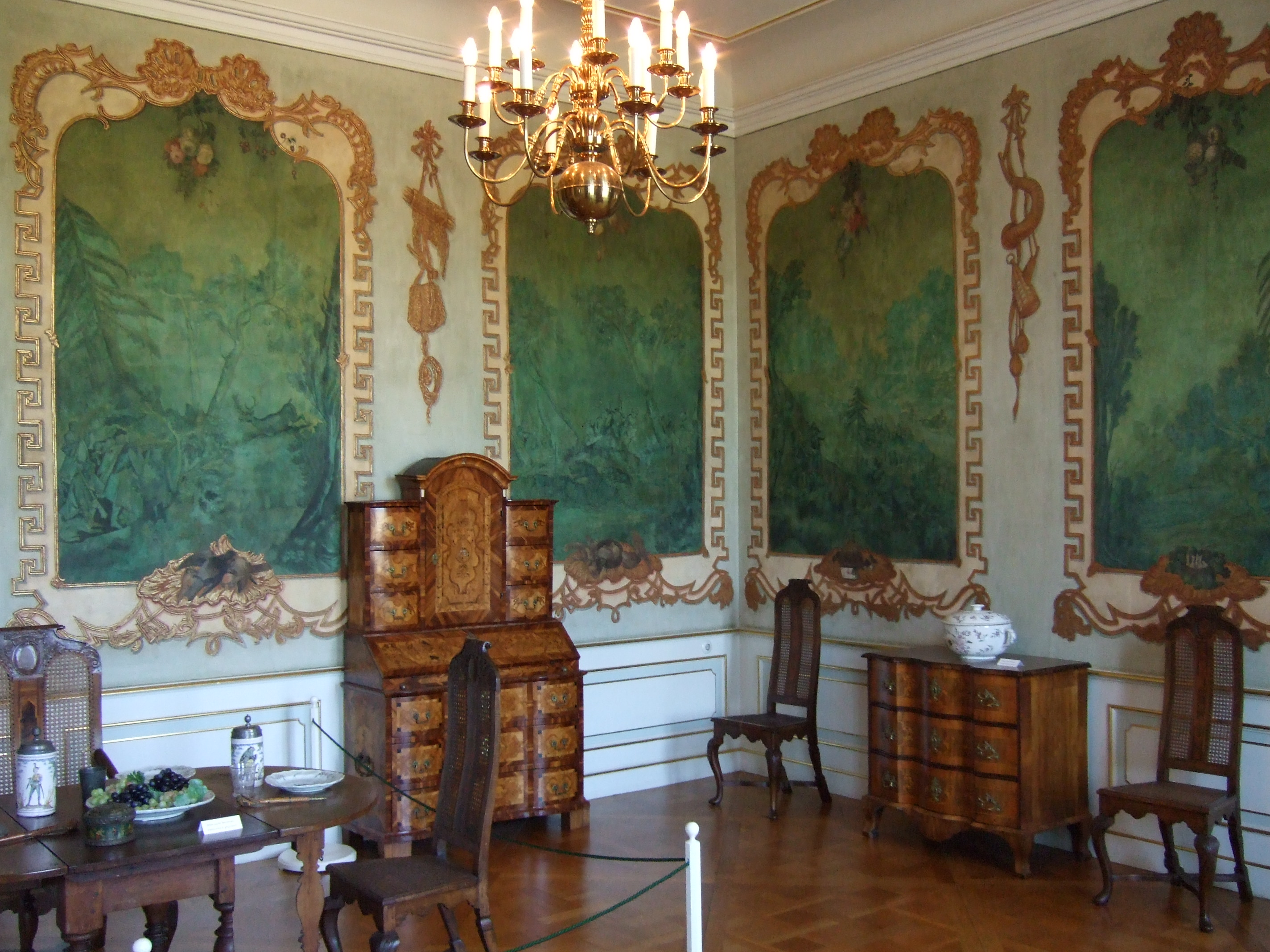 Das sogenannte Jagdzimmer im Erdgeschoss von Schloss Friedrichsfelde hat bemalte Leinwandtapeten aus Schloss Ostrau bei Bitterfeld in Sachsen-Anhalt. Die grün in grün gemalte 13 Wandfelder mit Waldlandschaften und Jagdszenen in goldener Rahmenmalerei wurden 1720/30 geschaffen und 1980/83 mit großem Aufwand restauriert. Sie wurden nach Schloss Friedrichsfelde übertragen in der Zeit, als Schloss Ostrau in ein Internat umgestaltet wurde.